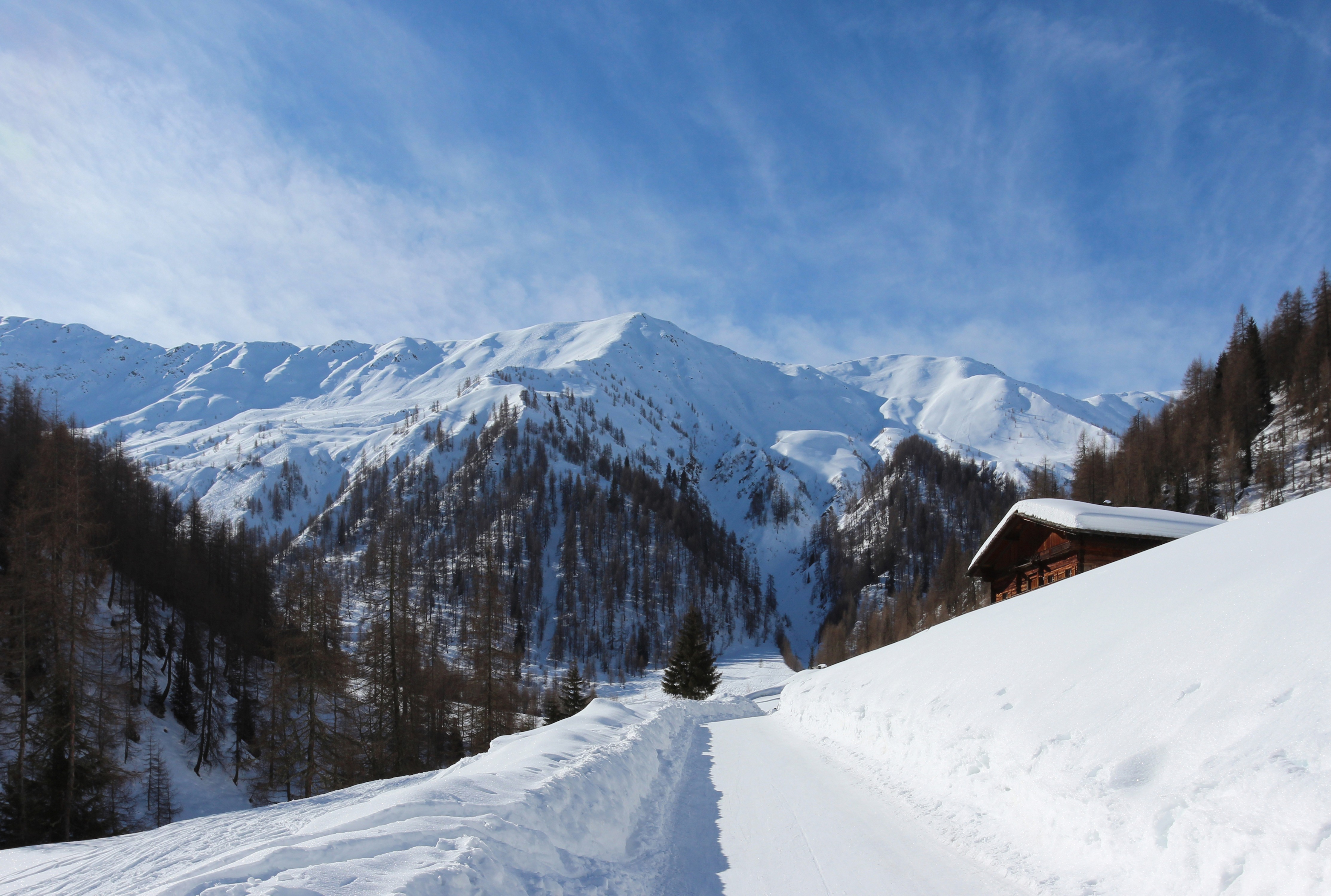 Ausblick unweit Kalkstein in der Gemeine Innervillgraten, Österreich.